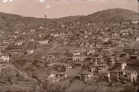 Общ изглед от с. Левочево, Смолянско.